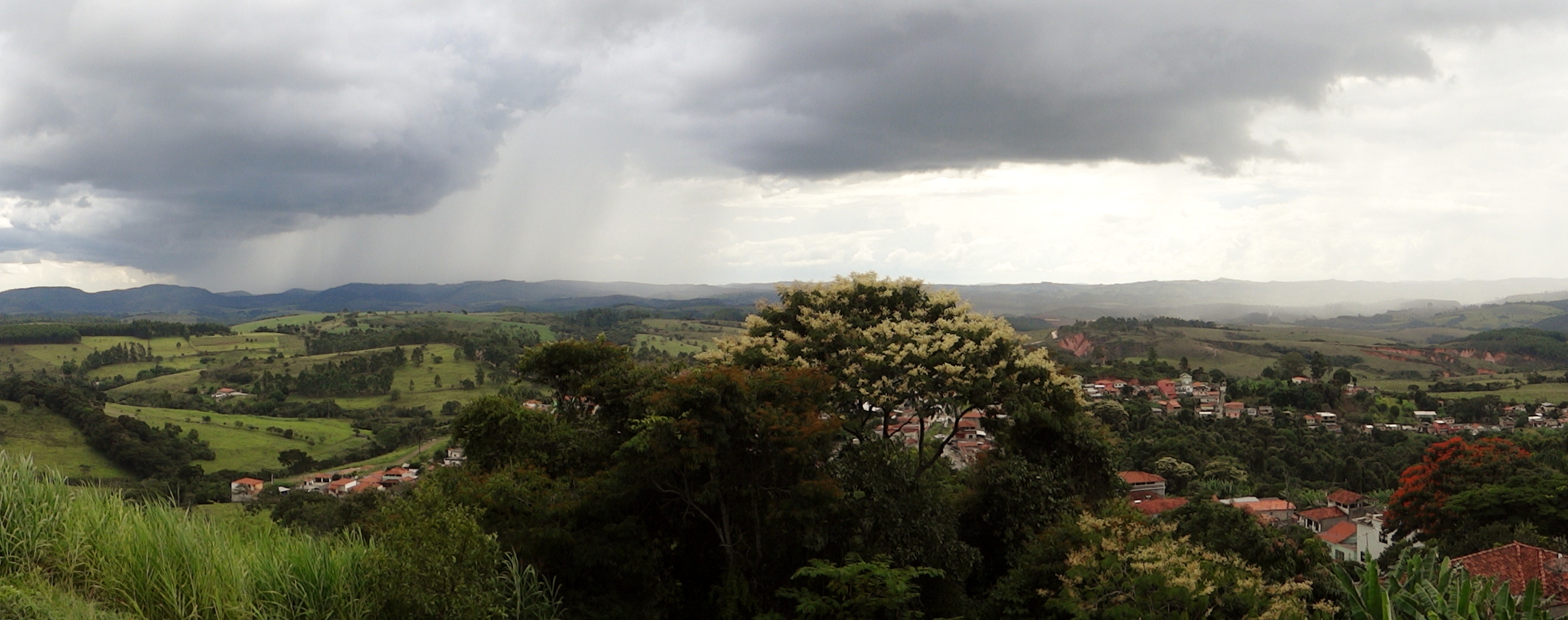 Vista da serra de São José a partir de Resende Costa.